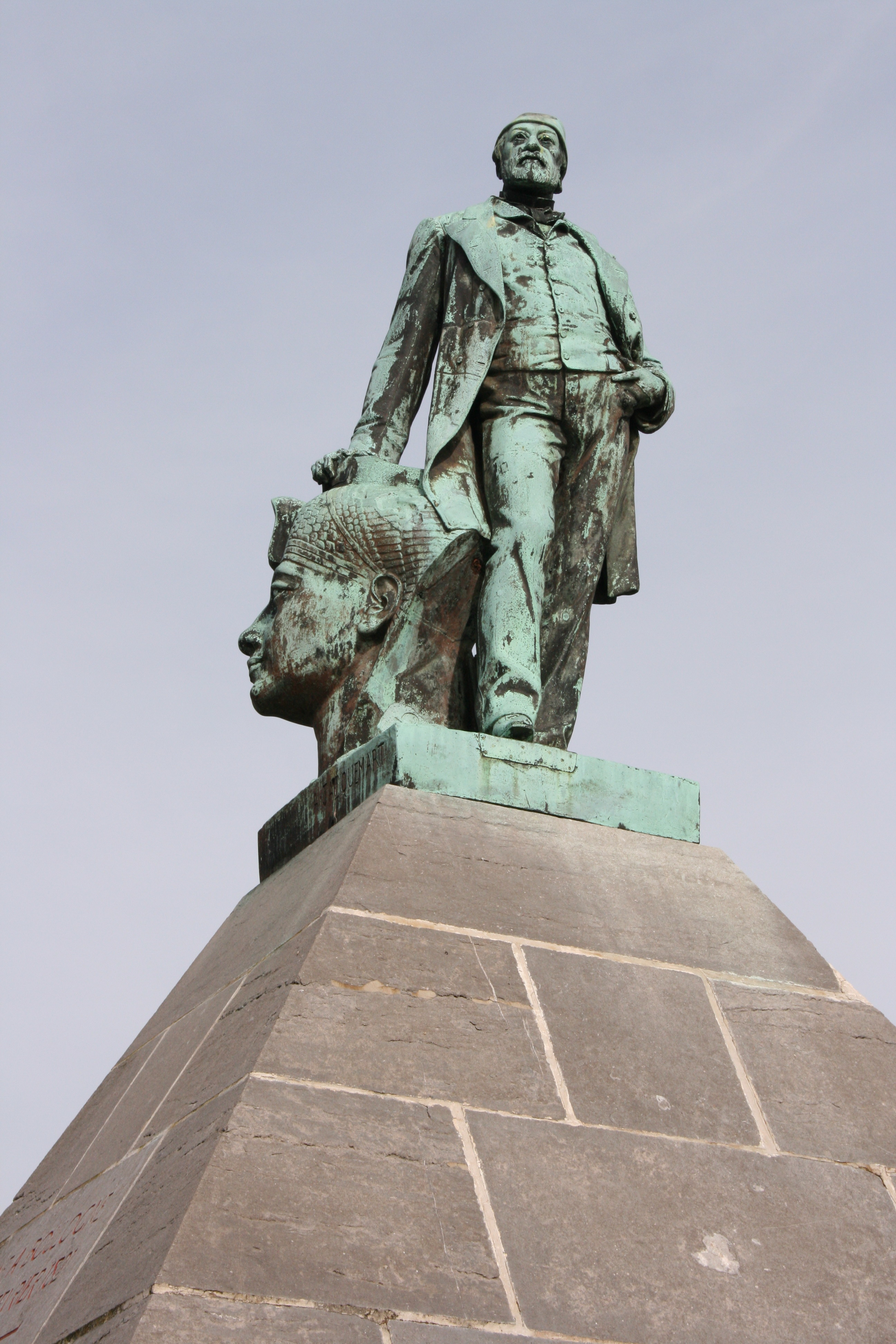 Statue de l'égyptologue Mariette sur sa pyramide. Square Mariette, Boulogne-sur-Mer, département du Pas-de-Calais, France